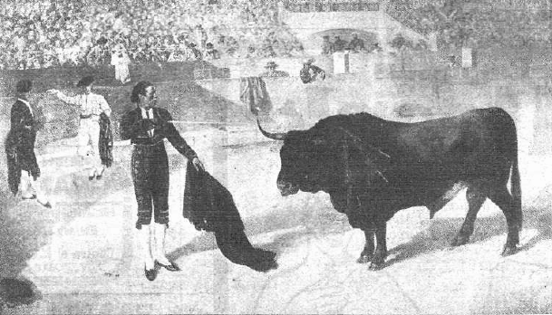 Reproducción de una estampa de la época en la que se vé al torero español Frascuelo en el momento de entrar a matar